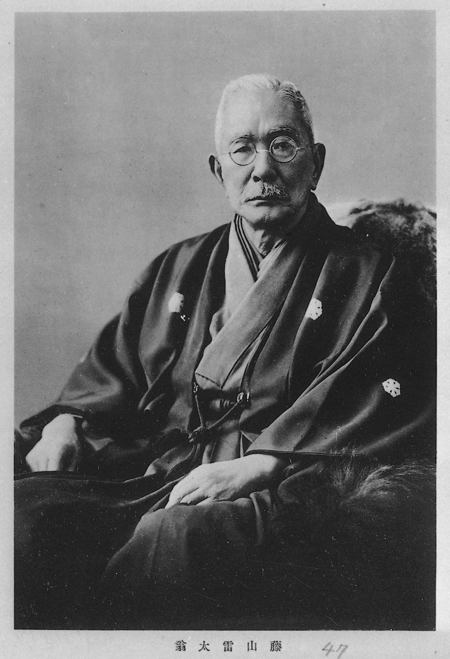 Portrait of Fujiyama Raita (藤山雷太, 1863 – 1938)